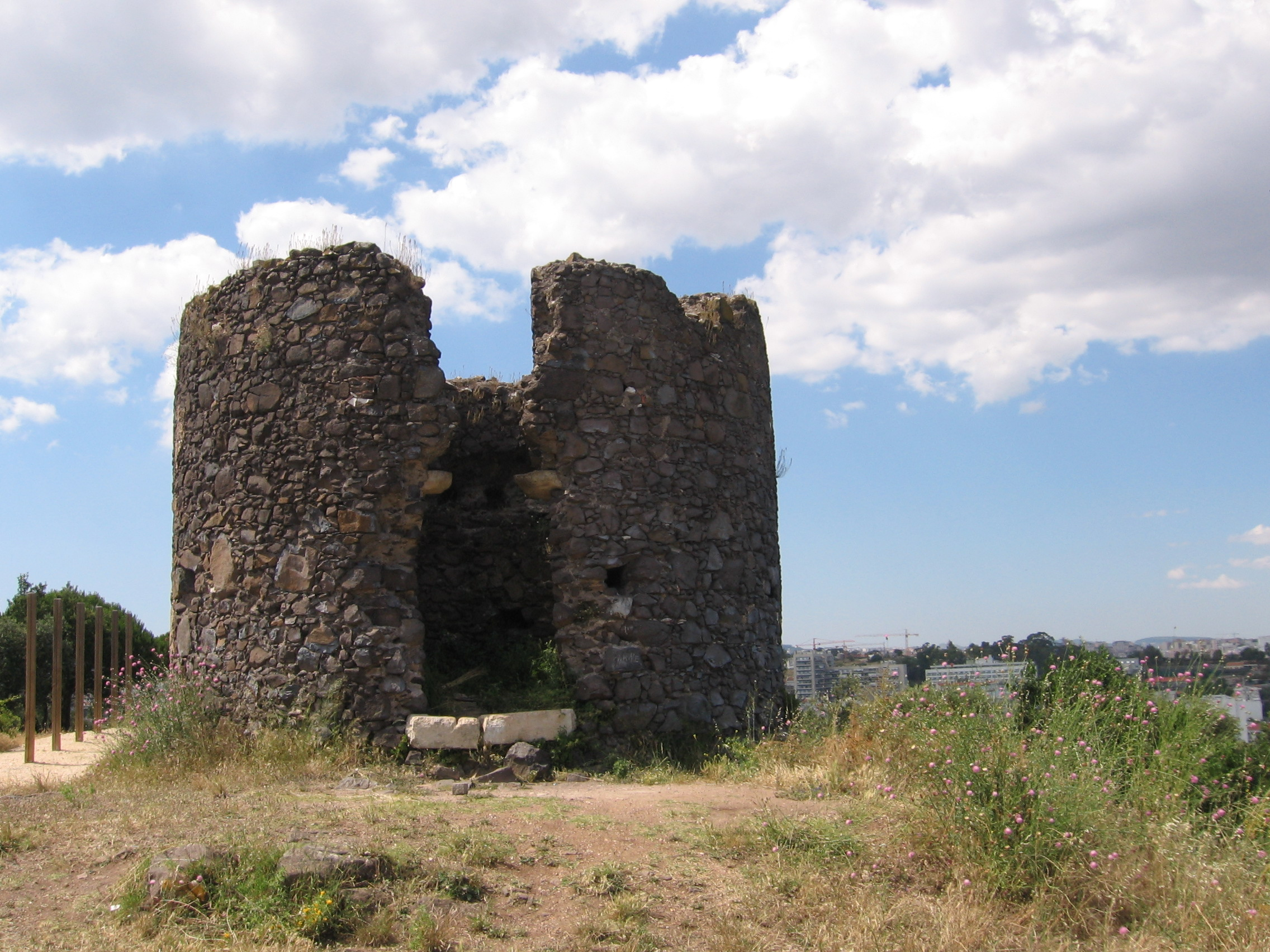 Moinho do Calhau, Parque Florestal de Monsanto, Lisboa, Portugal